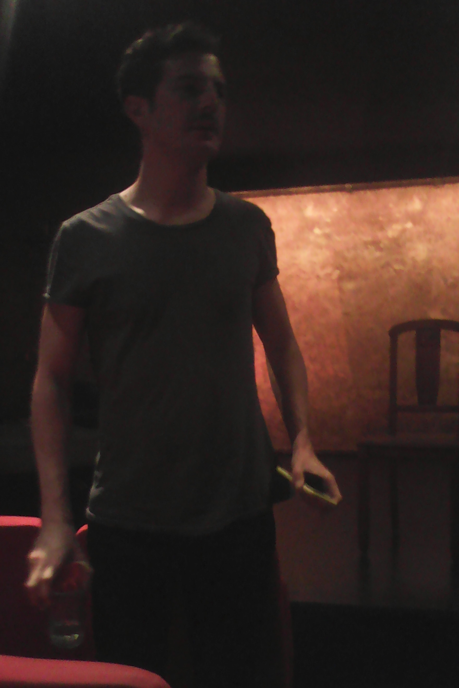 Charles Templon en 2018